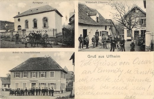 Ansichtskarte vonn Uffheim im Elsass